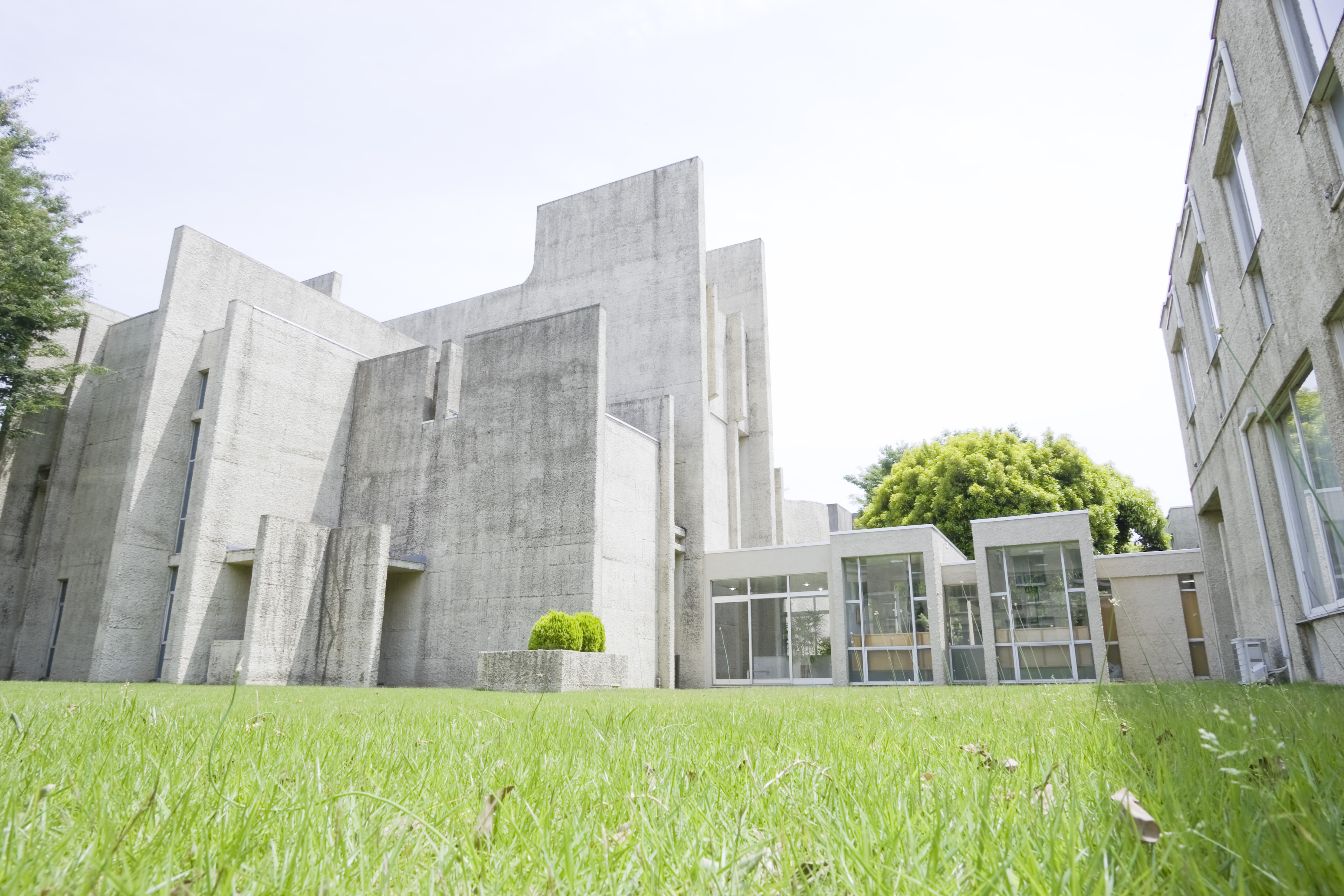 ルーテル学院大学